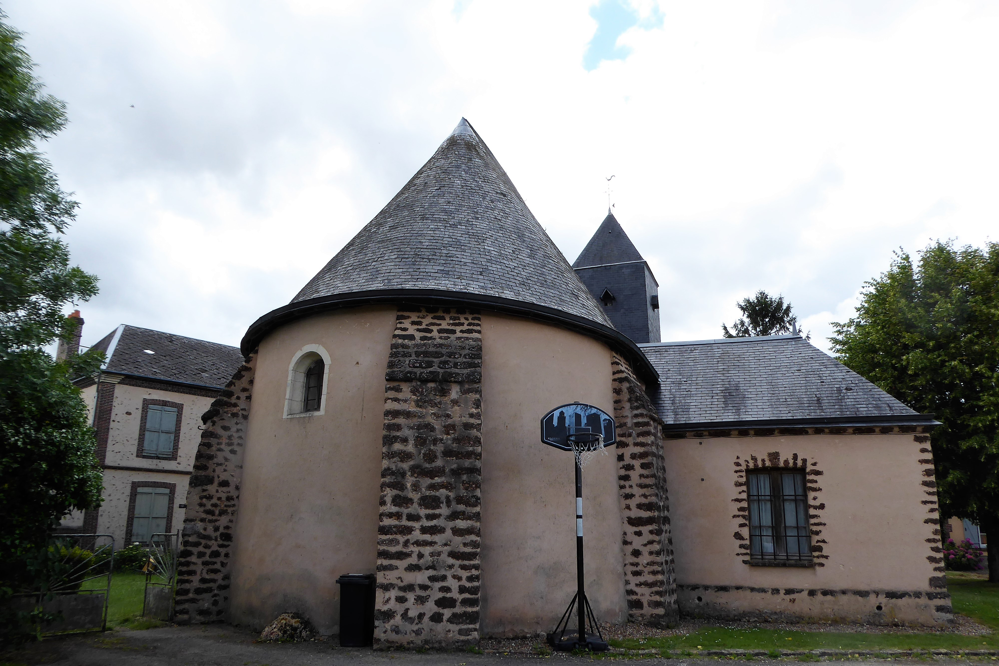 église Notre-Dame, Moulhard, Eure-et-Loir, France.